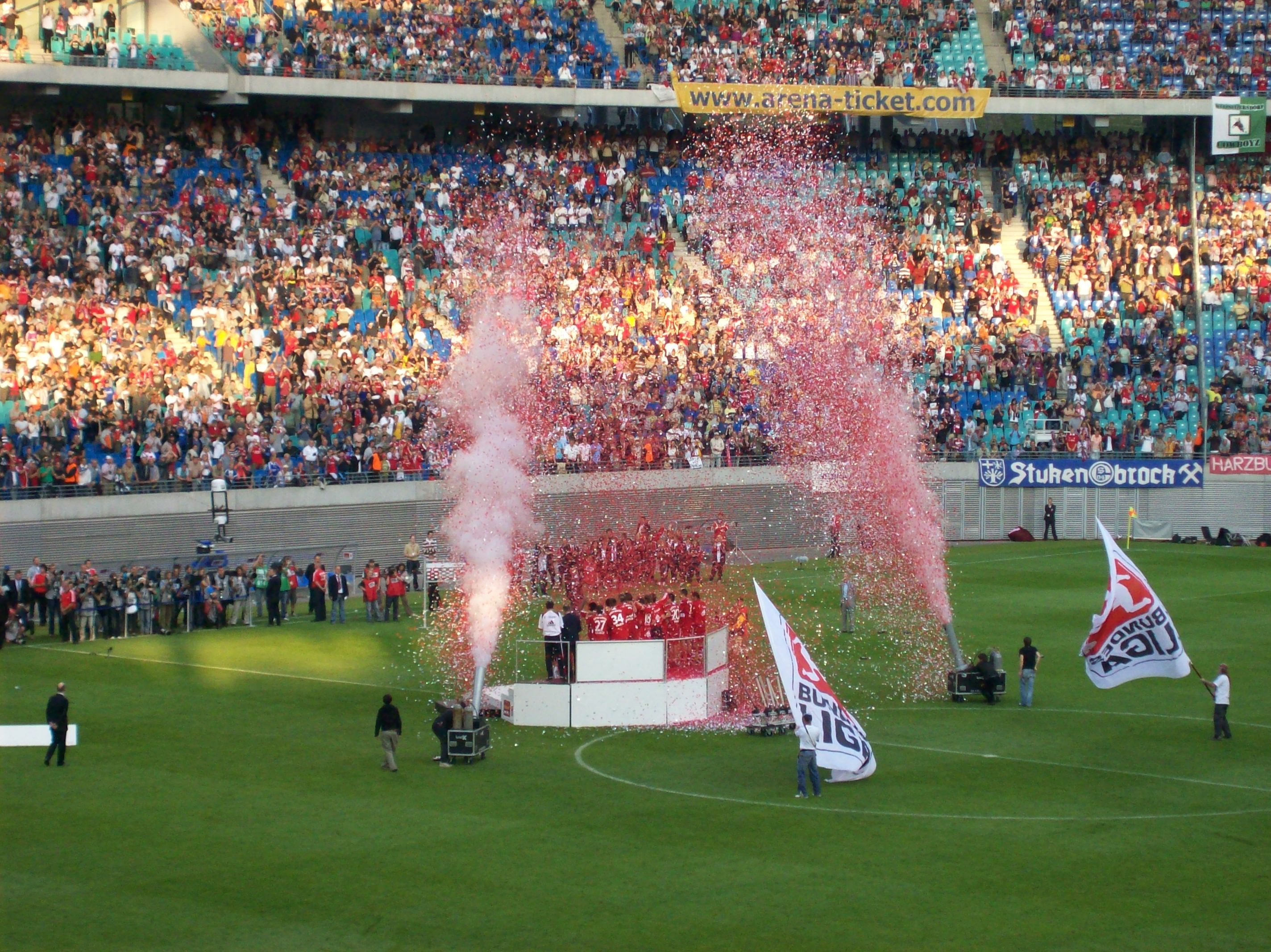 Ligapokalfinale 2007 in Leipzig.